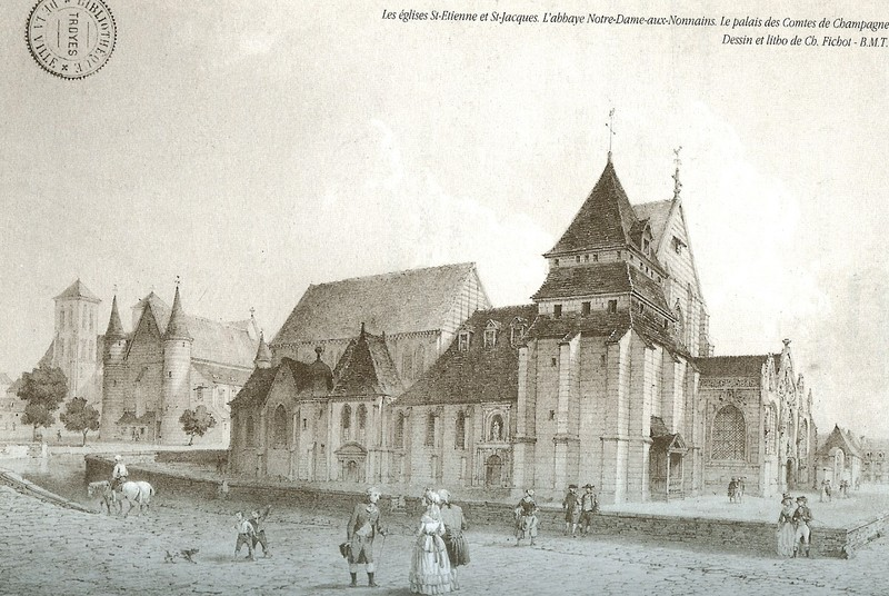 Les eglises St-Etienne et Jacques, L'abbaye Notre-Dame-aux-Nouvains. La palais des Comtes de Champagne.